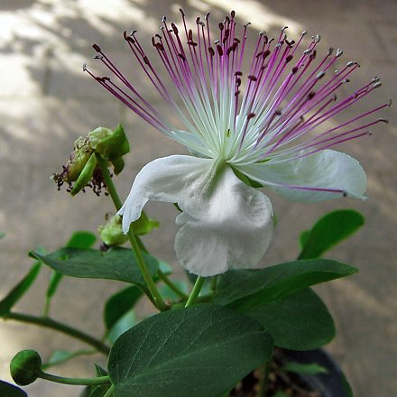 Kapernpflanze